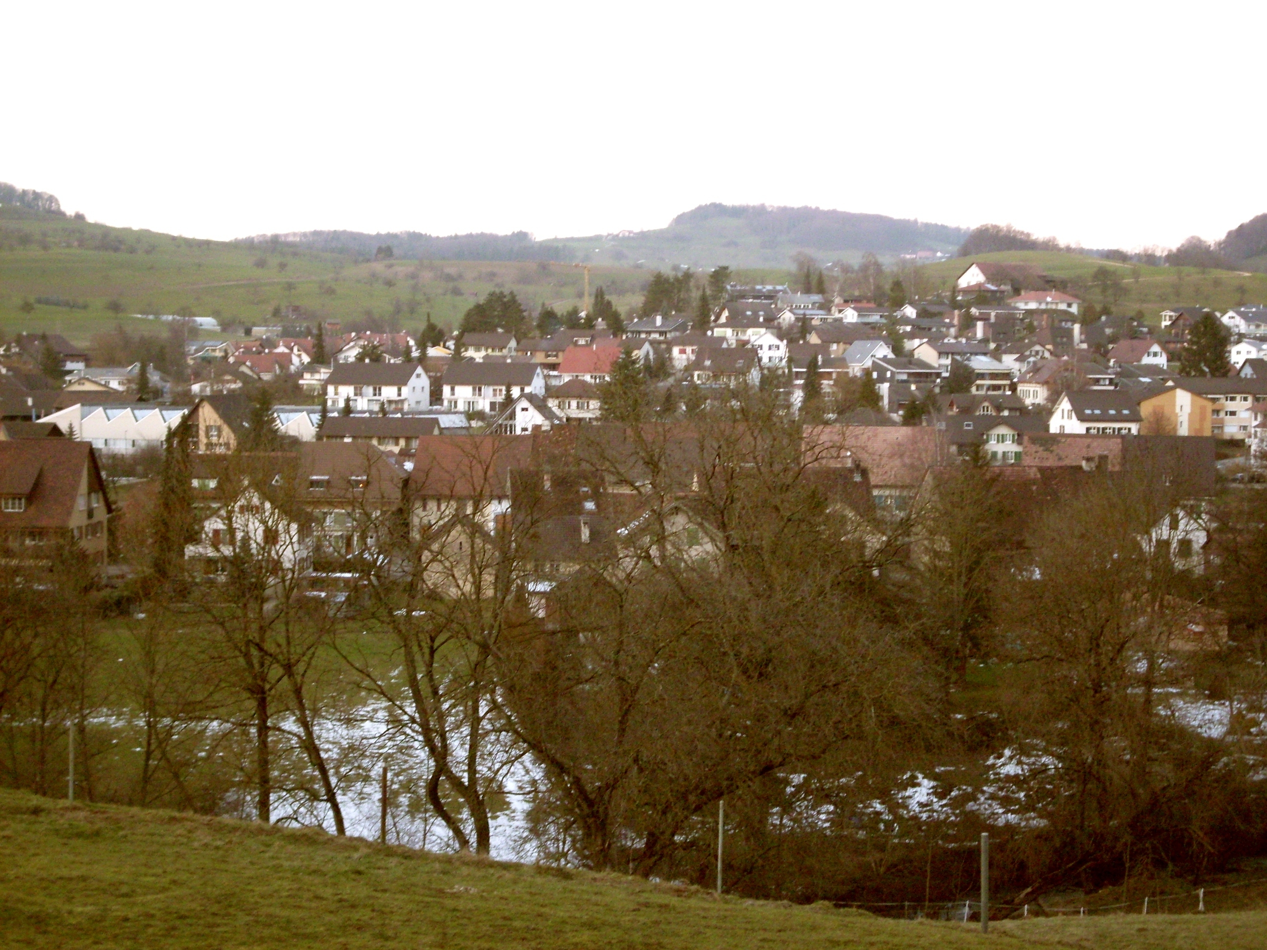 Teilansicht von Ormalingen, Schweiz